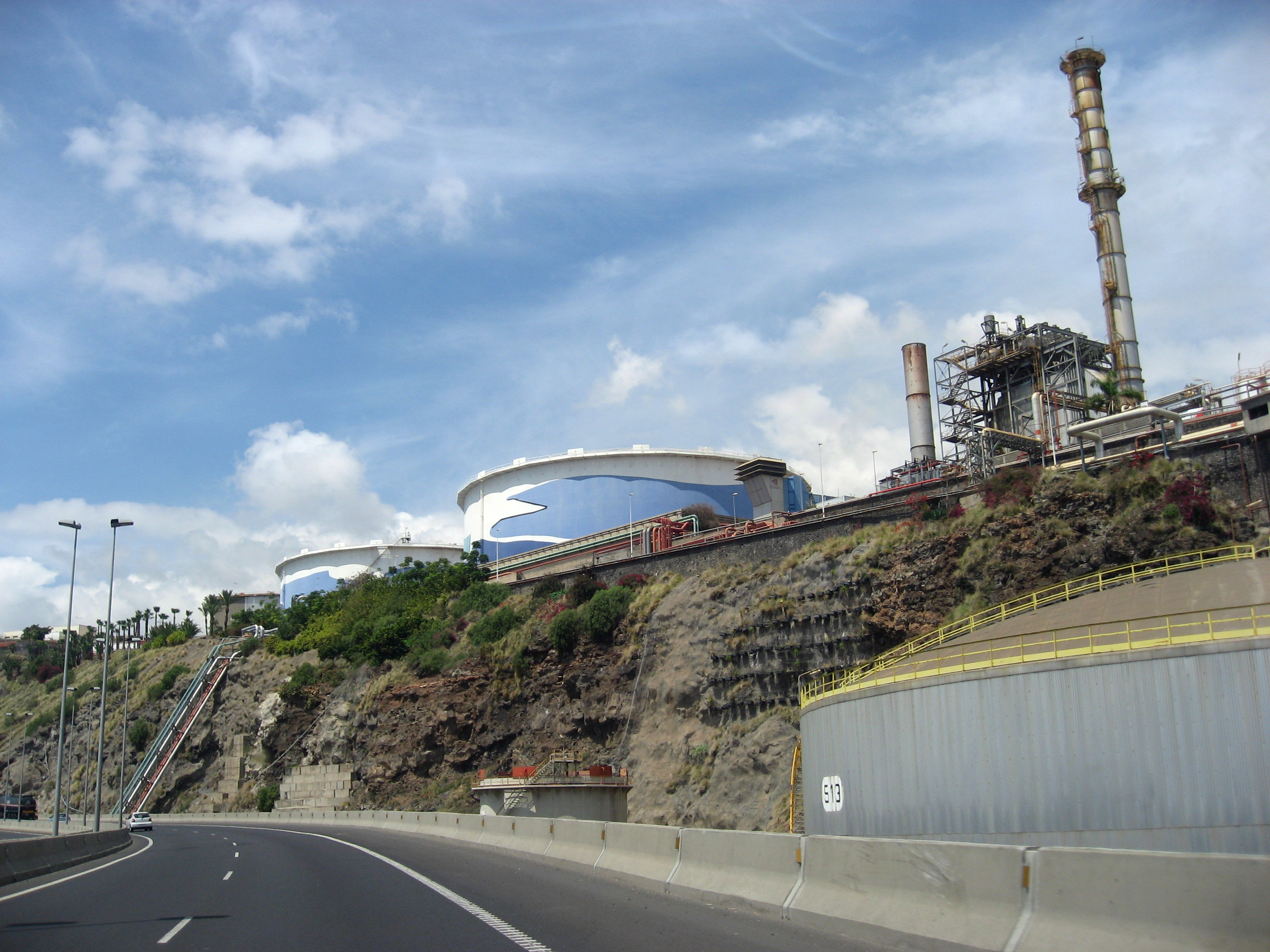 Instalaciones de la refineria de Santa Cruz desde la vía de penetración.